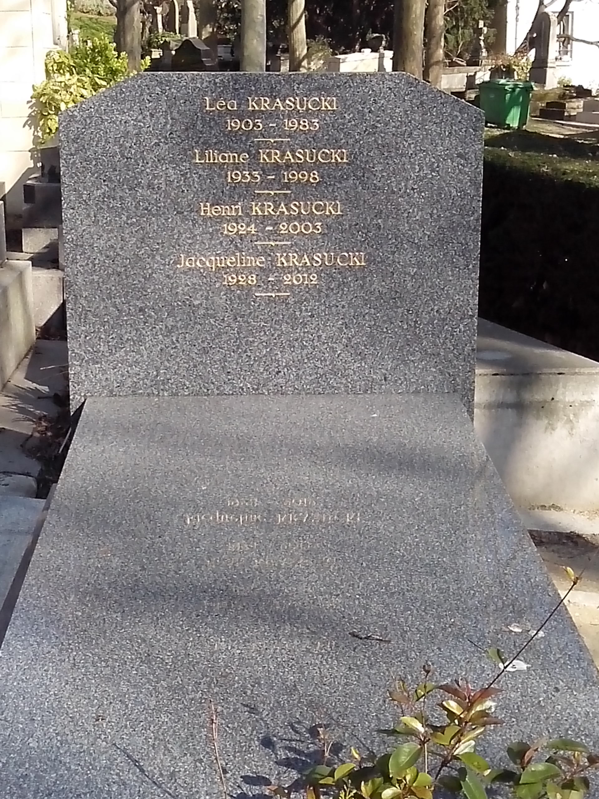 Sépulture d'Henri Krasucki (1924-2003), secrétaire général de la CGT et dirigeant du Parti communiste français ; sa mère Léa Krasucki (1903-1983), sa sœur Liliane Krasucki (1933-1998), et sa femme Jacqueline Krasucki (1928-2012).